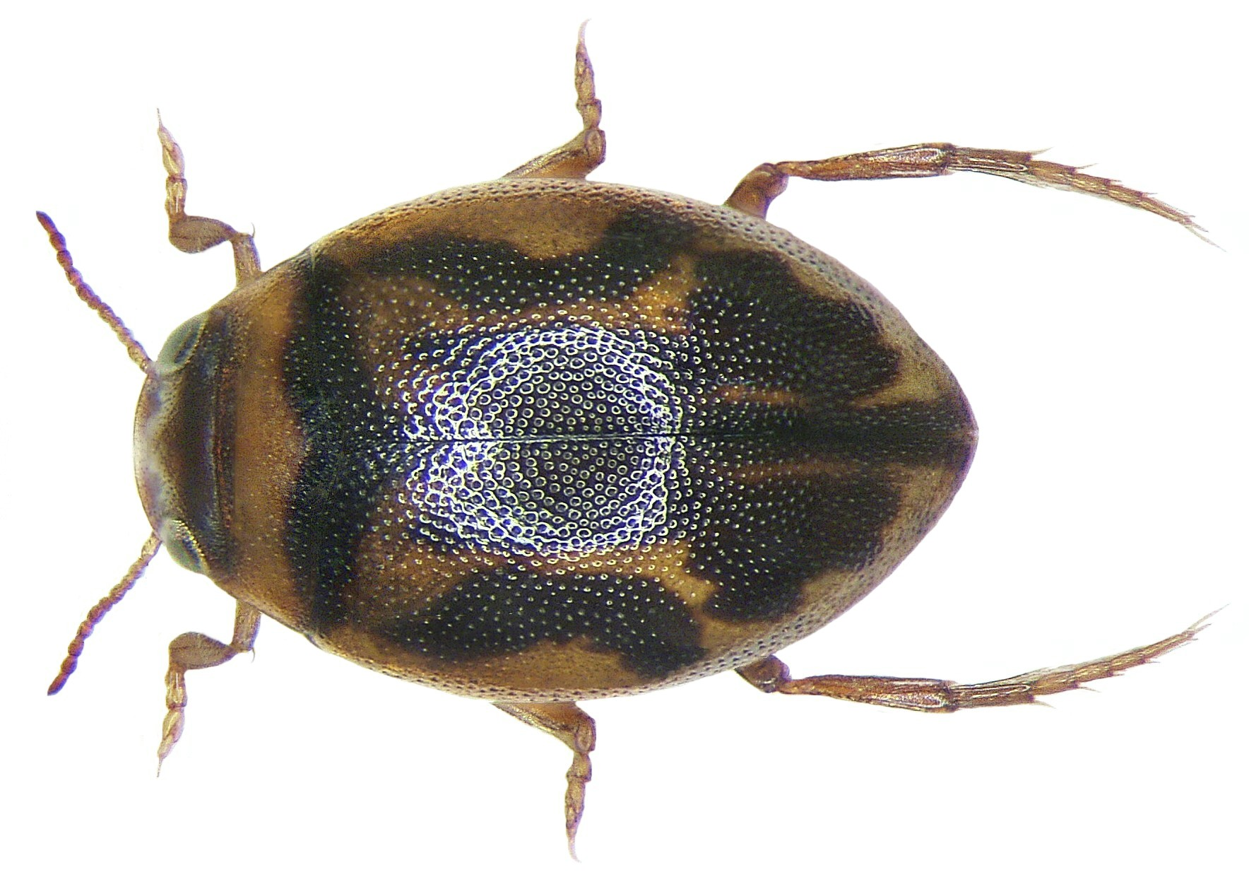 Hygrotus inaequalis (Fabricius, 1776) Familie: Dytiscidae Grösse: 3-3,7 mm Verbreitung: Europa Fundort: Germania, Oberpfalz, Wörth a. d. Donau leg.det. U.Schmidt, 1975 Foto: U.Schmidt, 2008